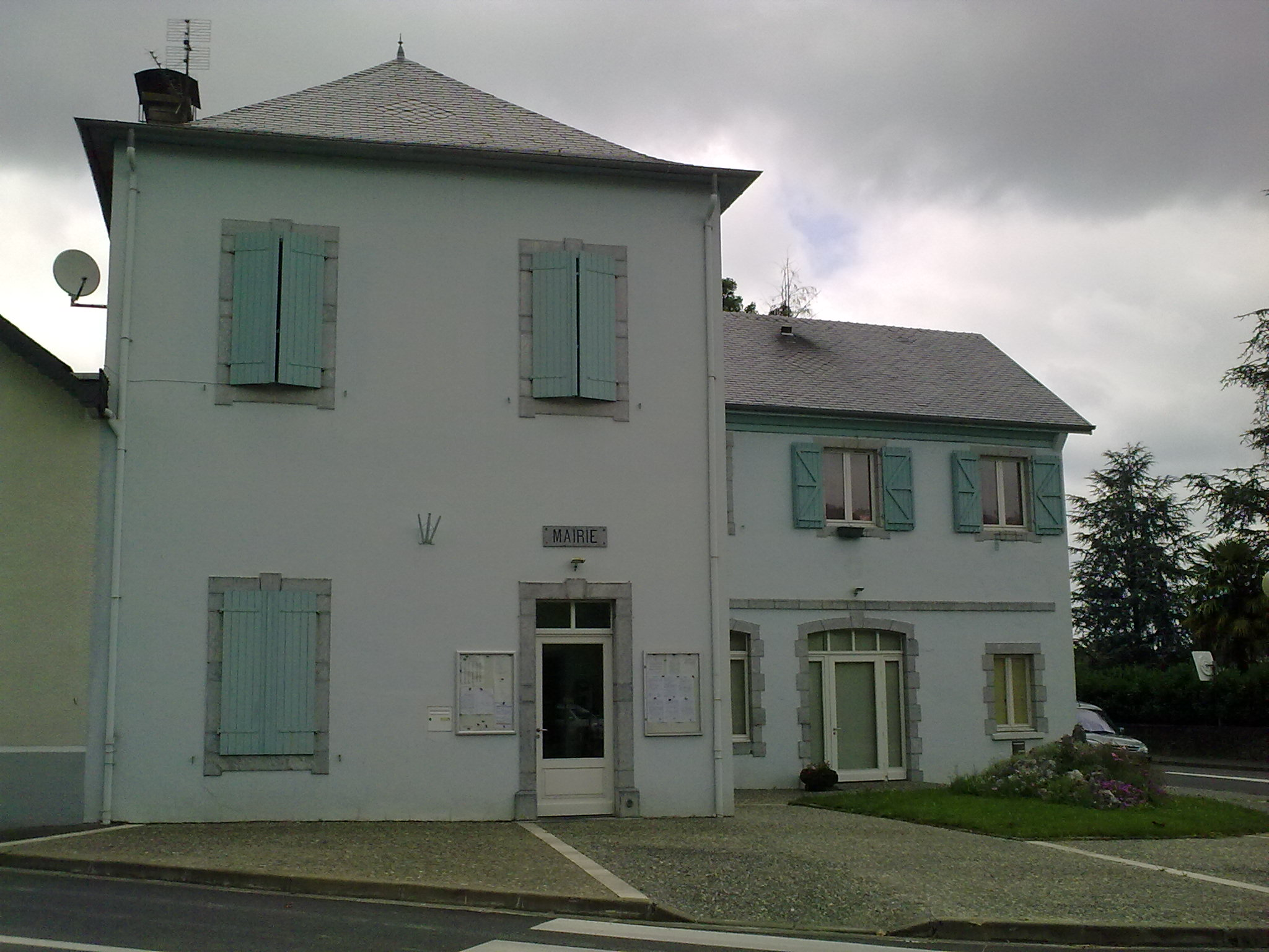 Féas le 4 juillet 2010.